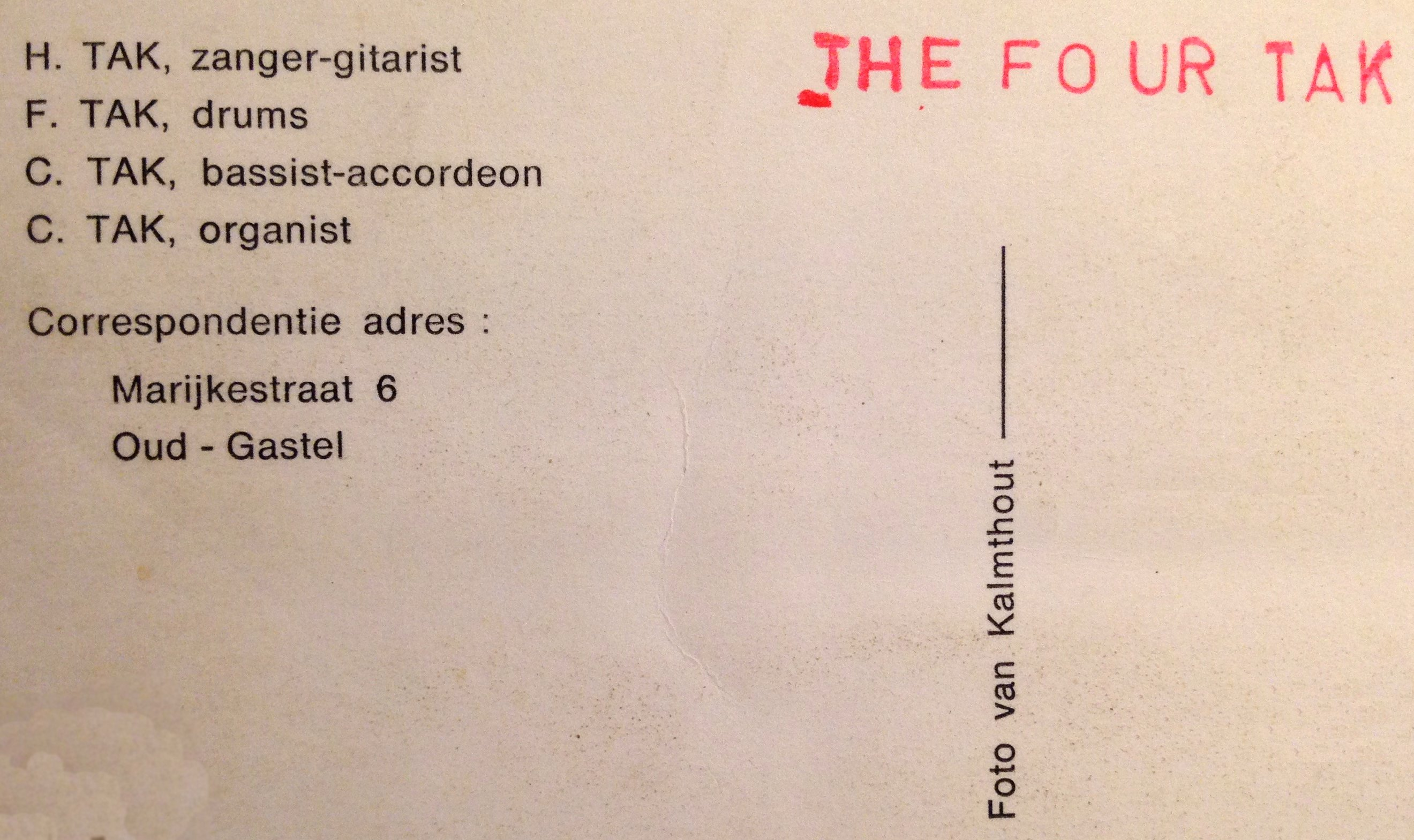 The Four Tak (foto gevonden in oud kloosterboek, achterzijde)